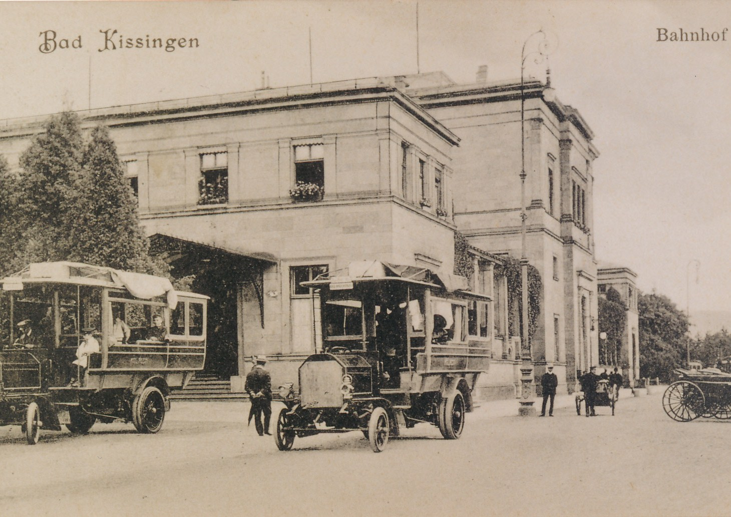 Postkarte mit Ansicht des Bahnhofs Bad Kissingen aus dem Jahr 1909